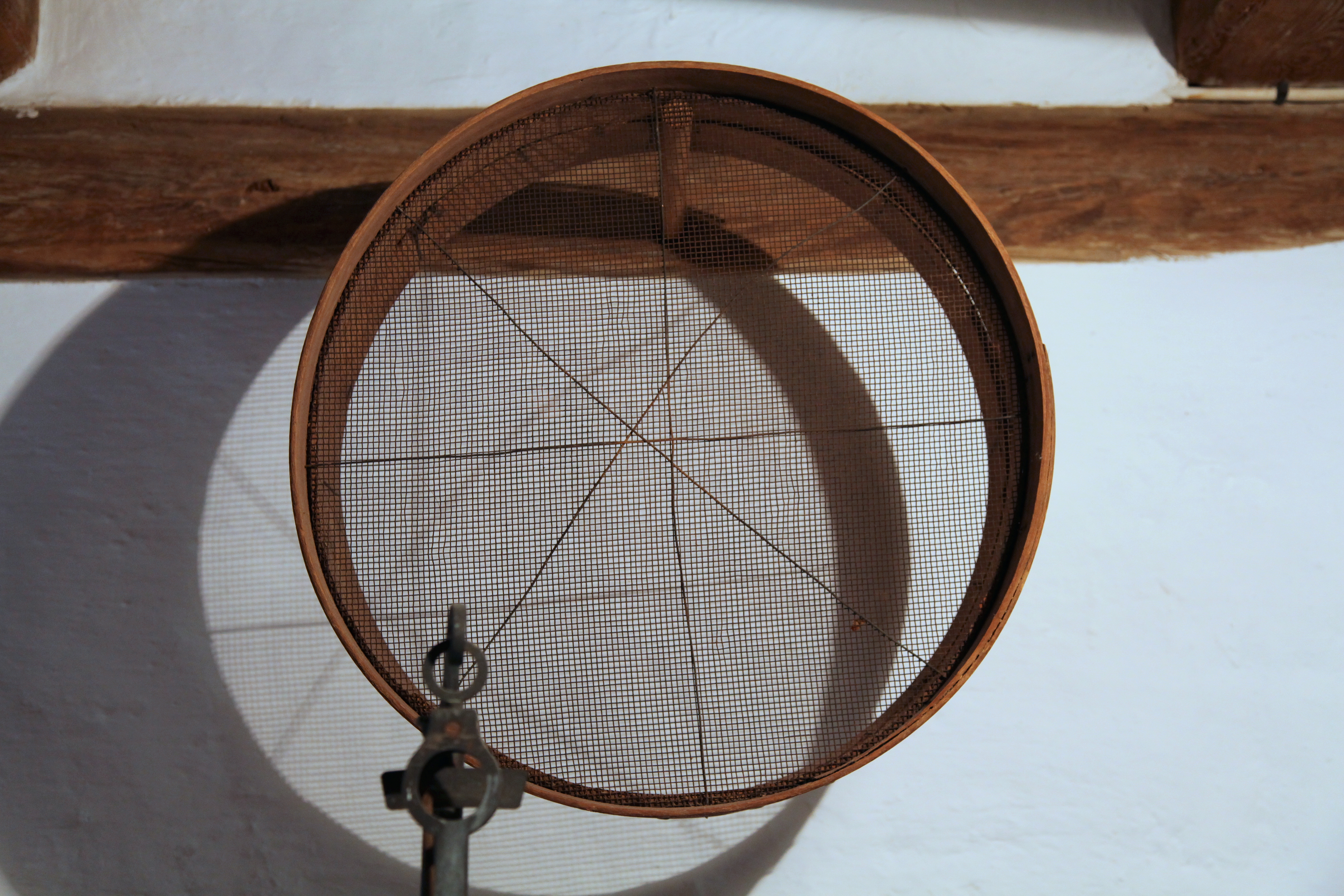 Alte Pfefferküchlerei, August-Bebel-Platz 3 in Weißenberg